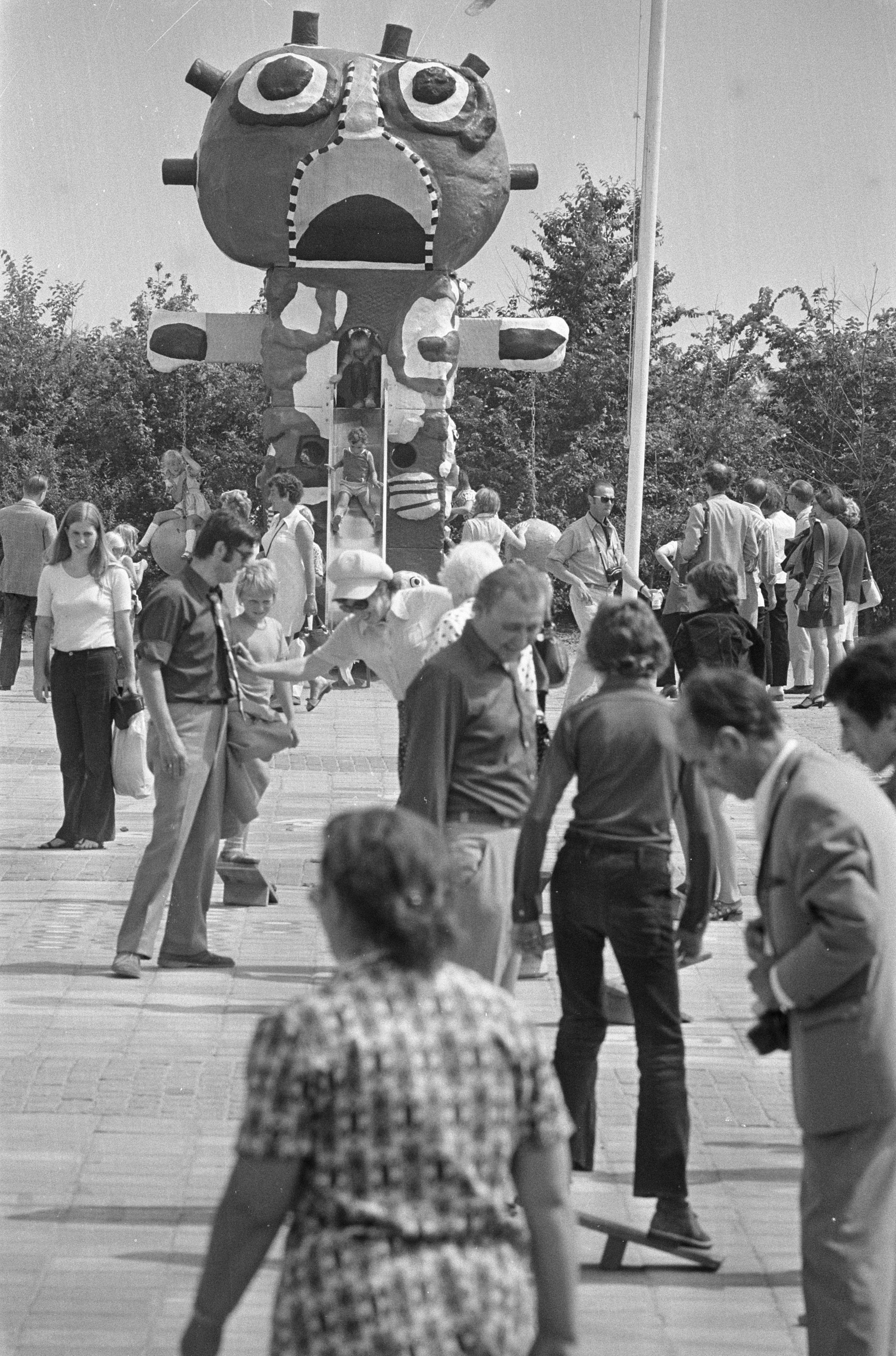 Collectie / Archief : Fotocollectie Anefo Reportage / Serie : [ onbekend ] Beschrijving : Floriade, kinderen op glijbaan van de Woezelflat Datum : 23 juli 1972 Trefwoorden : Kinderen Instellingsnaam : Floriade Fotograaf : Peters, Hans / Anefo Auteursrechthebbende : Nationaal Archief Materiaalsoort : Negatief (zwart/wit) Nummer archiefinventaris : bekijk toegang 2.24.01.05 Bestanddeelnummer : 925-7613